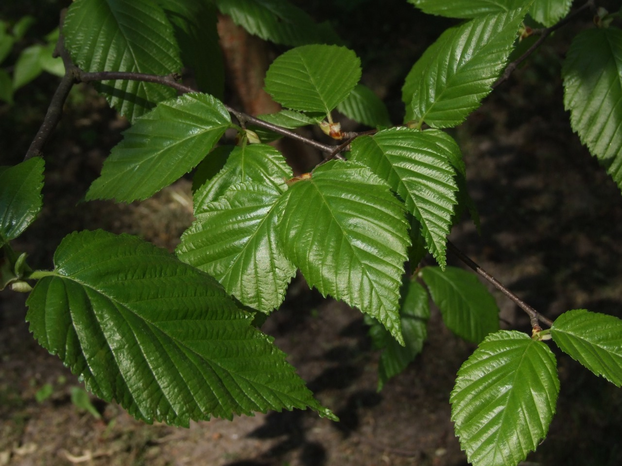 Betula alleghaniensis